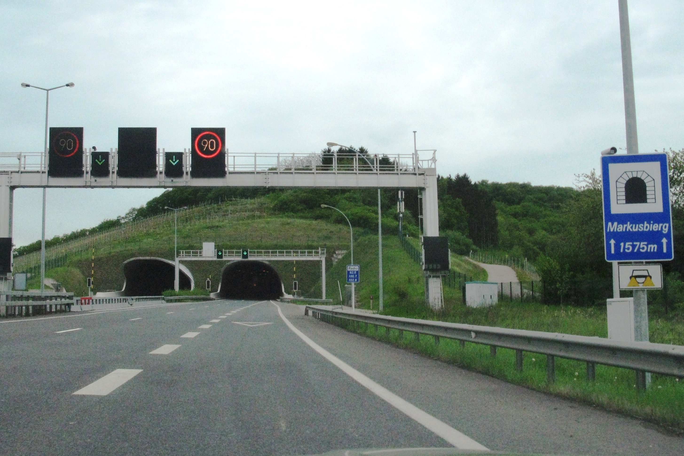 Tunnel Markusbierg Südportal. Markusbierg